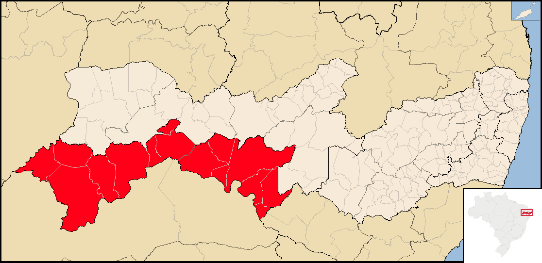 Localização da Mesorregião do São Francisco Pernambucano em Pernambuco.